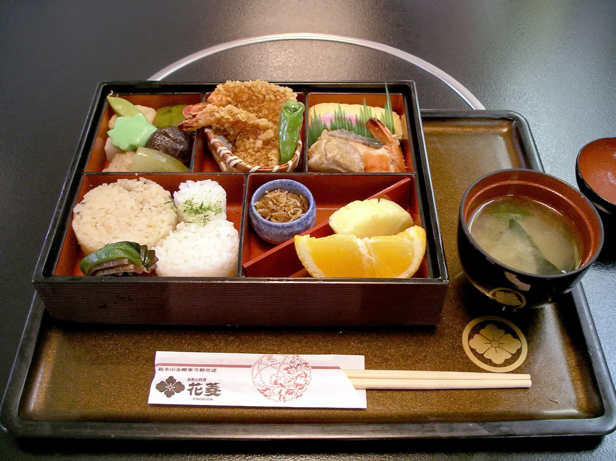 Bento at Hanabishi, Koyasan.日々是好日弁当